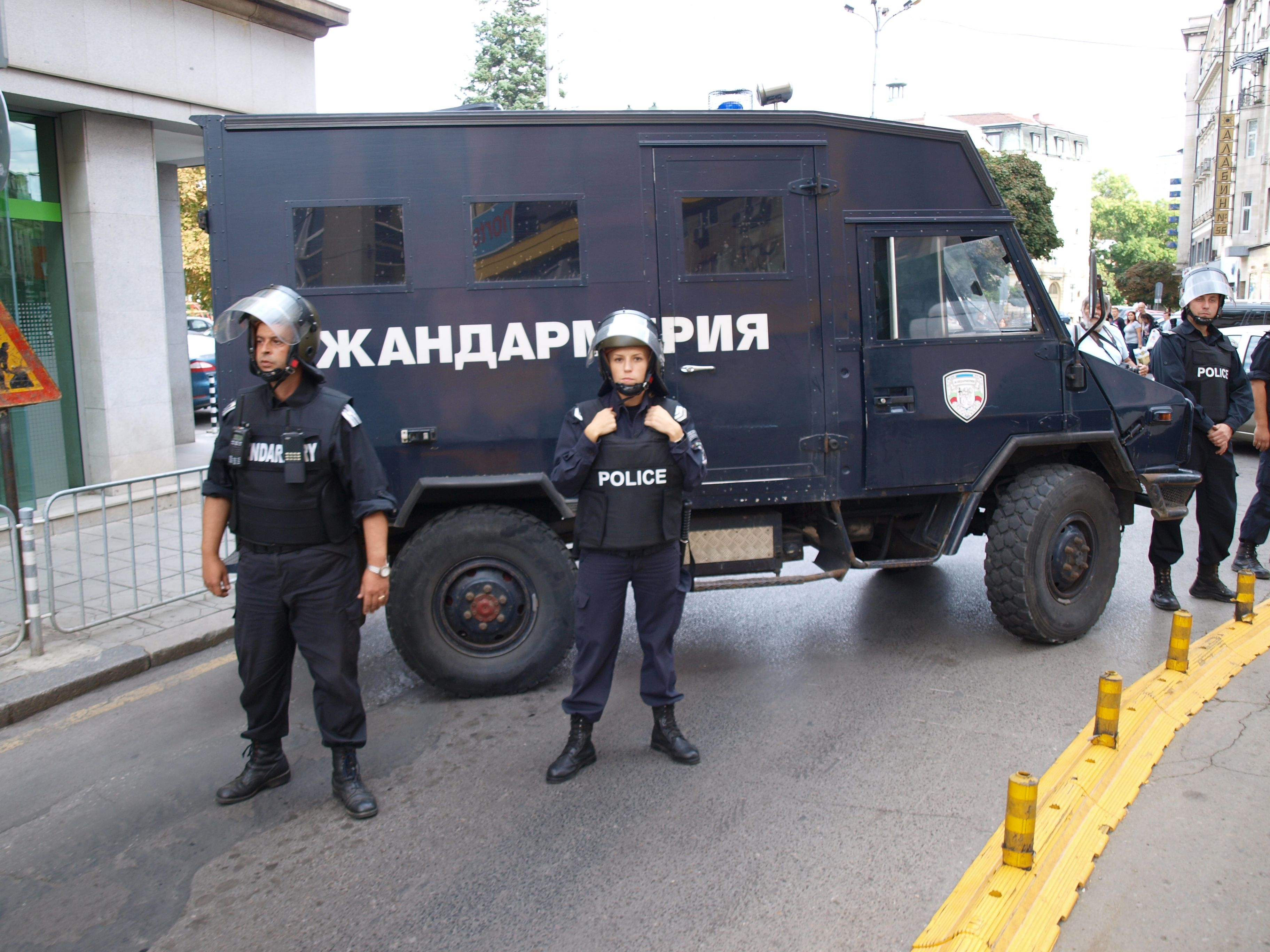 Жандармеристи, охраняващи протеста срещу циганската престъпност.